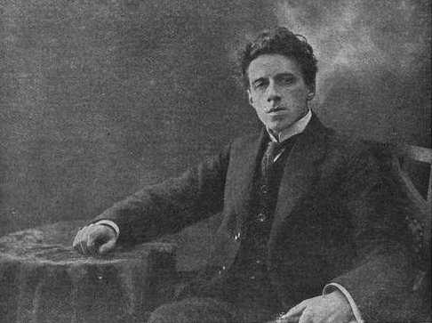 Режиссер Императорских театров Всеволод Эмильевич Мейерхольд.